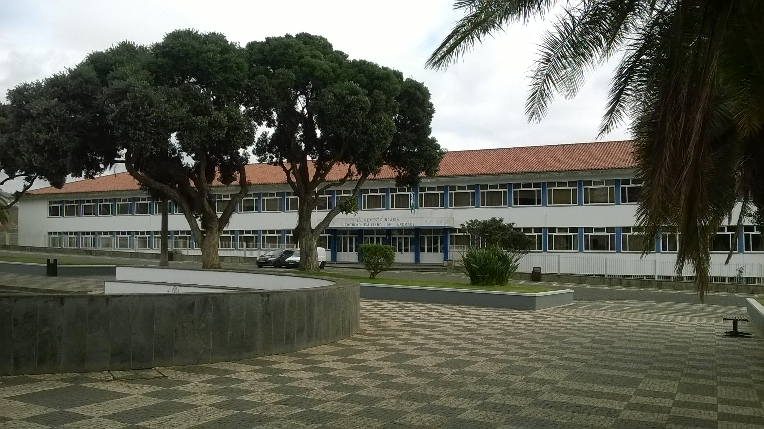 Escola Secundária Jerónimo Emiliano de Andrade, Angra do Heroísmo, ilha Terceira, Região Autónoma dos Açores, Portugal: vista da fachada principal.·